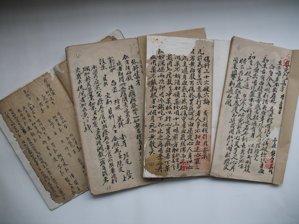 中文（台灣）: 唐時昌（1873-1913）醫稿真跡